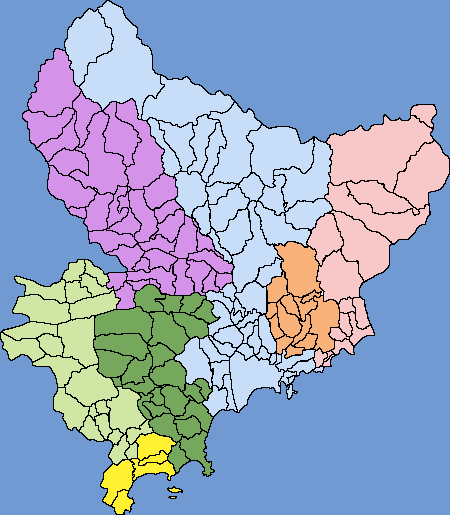 Alpes-Maritimes, liste des intercommunalités effective au 1er janvier 2014.